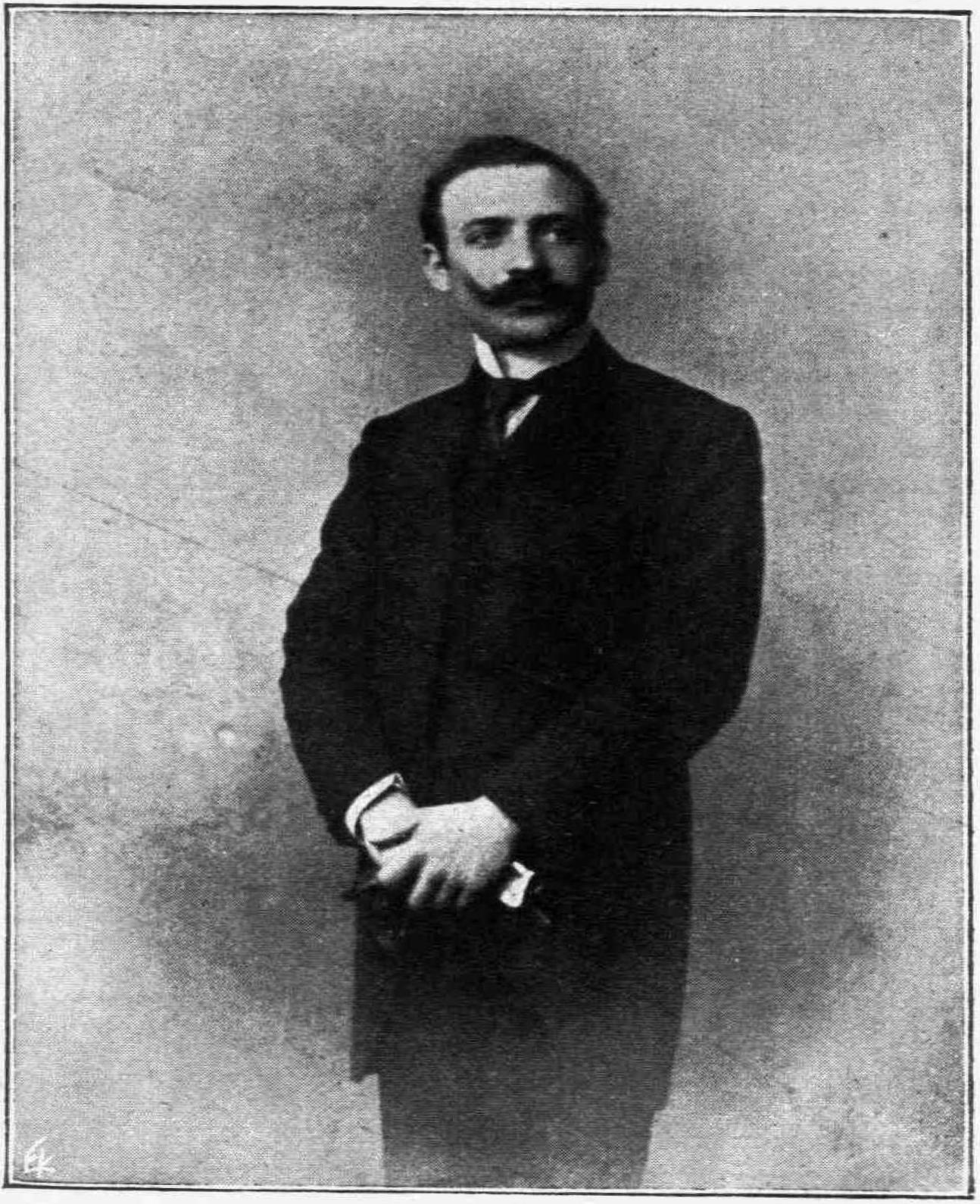 griechischer Dichter, Athen, 19. Jahrhundert